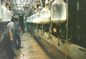 הרפת בכפר חרוב